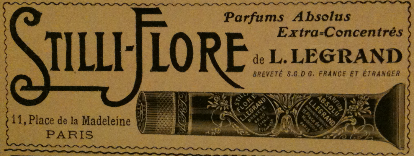 Publicité pour le stick de concentré de parfum "Stilli-Flore" par L. Legrand, Paris, parue dans Je sais tout en novembre 1909.